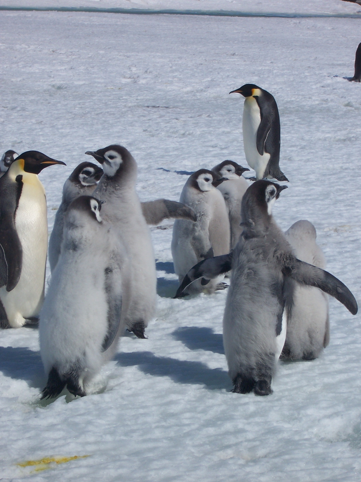 Crèche de poussins de manchots empereurs. Photo prise à coté de la base française Dumont d'Urville en Antarctique.